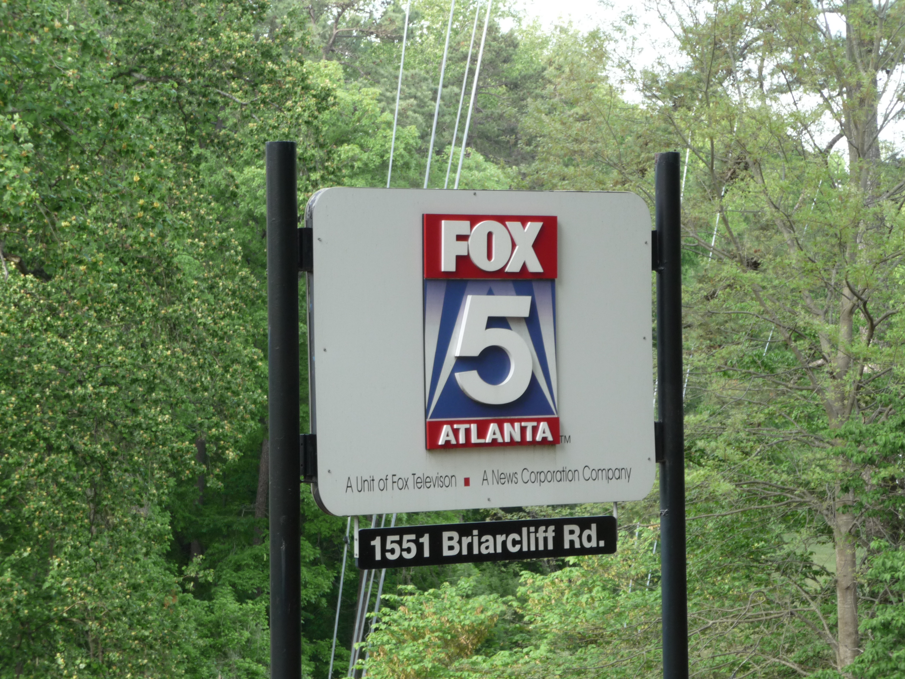 Fox 5 Atlanta sign